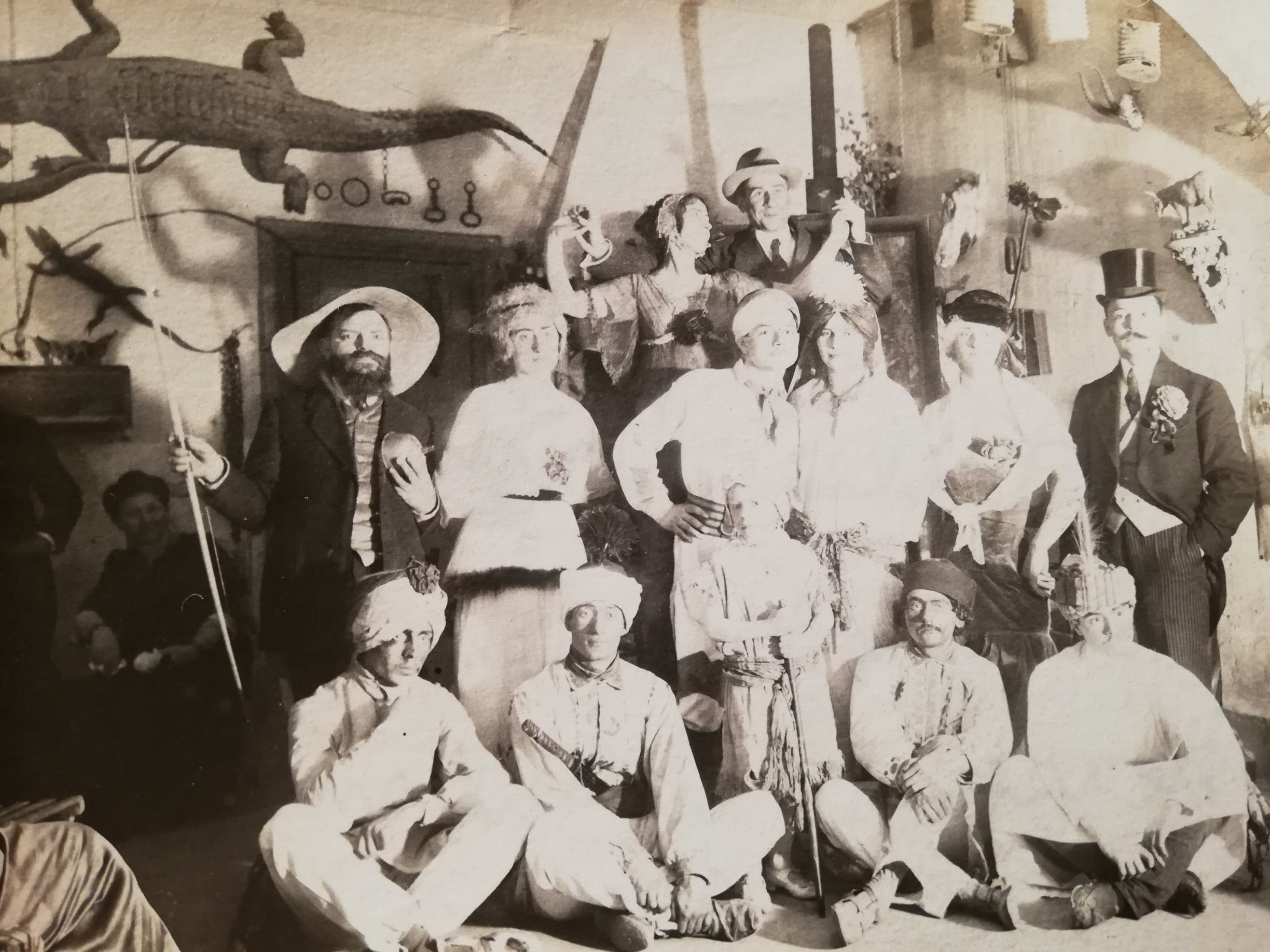 Accroupis : Fredureau, Balik, Bousquet En sultane Jeanne Piffard